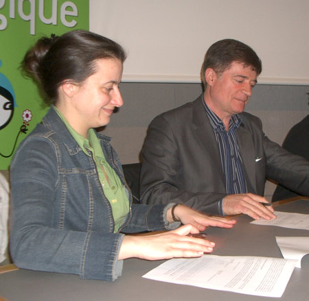 Signature le 18 mars 2007, par Cécile Duflot et Gustave Alirol, de l'accord entre Les Verts et Régions et peuples solidaires (RPS) actant le soutien des régionalistes à la candidature de Dominique Voynet à l’élection présidentielle française de 2007 et l'alliance entre les deux partis pour les élections législatives françaises de juin 2007.